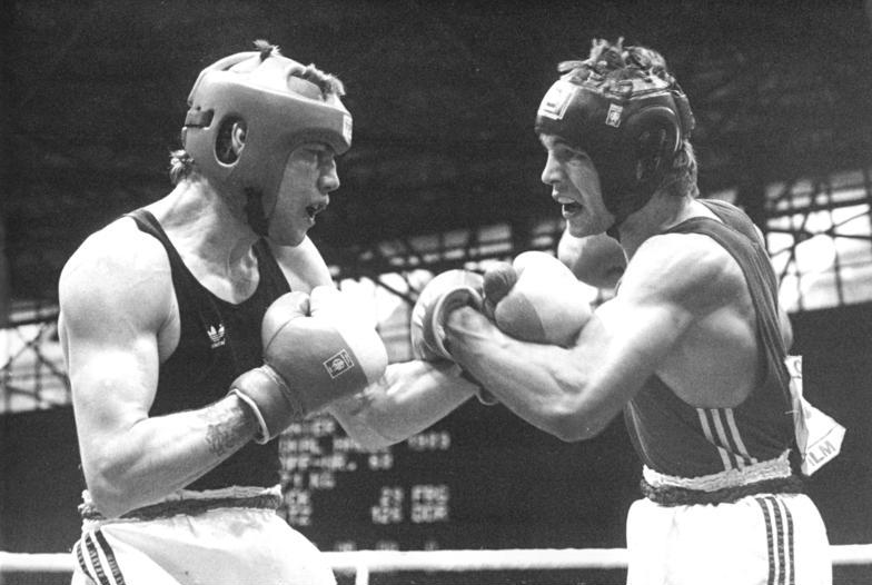 ADN-ZB Lehmann 25.3.89 Halle: XVIII. Internationales Boxturnier um den Chemie-Pokal-Halbfinale-Eindeutig besiegte der vierfache DDR-Meister Tortsen Schmitz (SC Traktor Schwerin-rechts) den Dritten der BRD-Meisterschaften Michael Gusnick (SV Astoria Berlin (West) und zog mit einem 5:0-Kampfrichterurteil in das Finale ein.